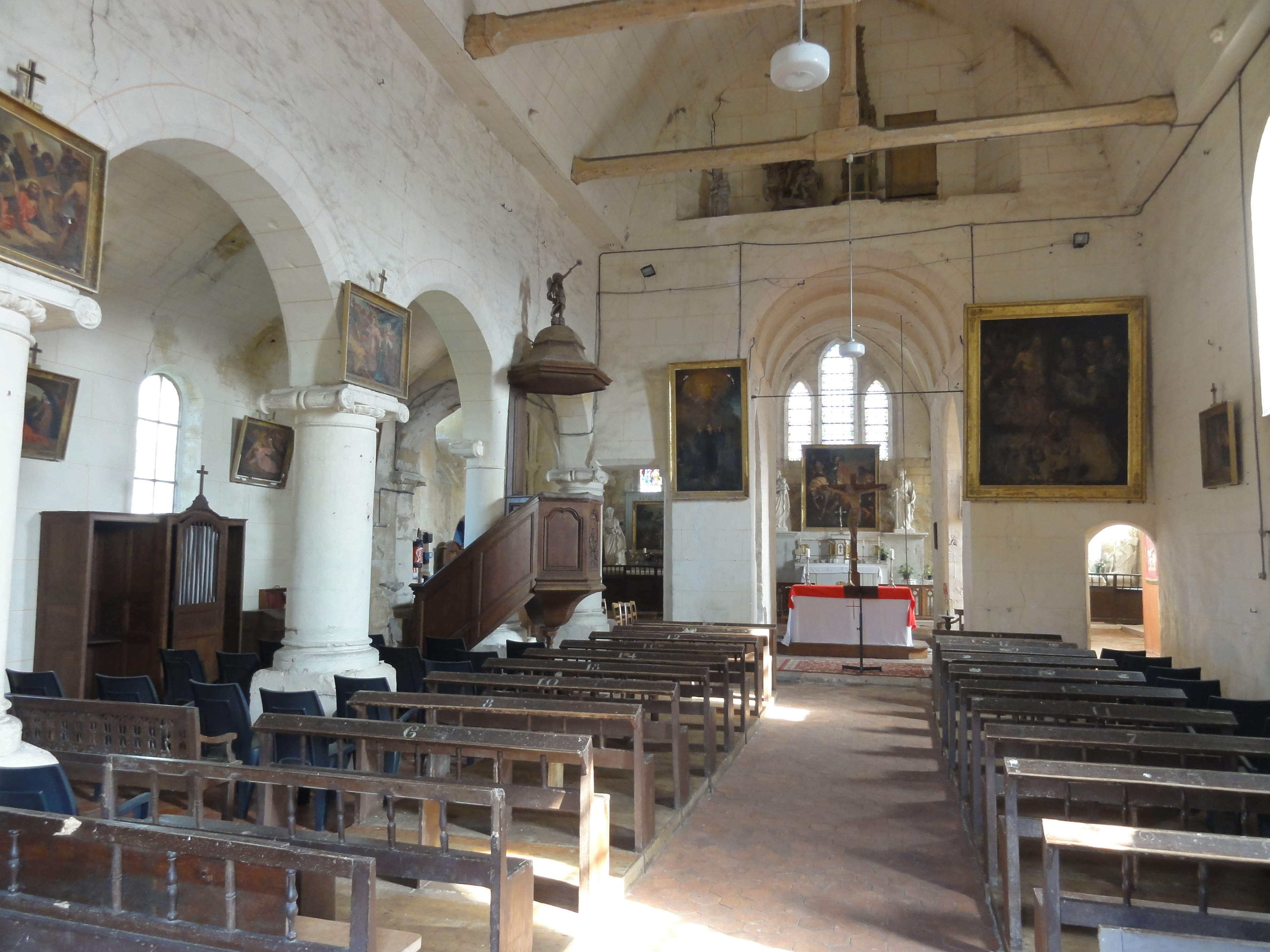 Intérieur de l'église - voir titre.